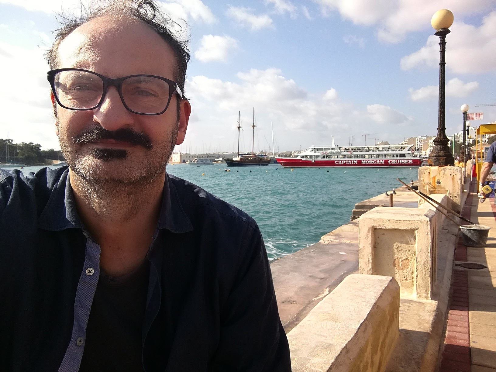 Davide-Grittani